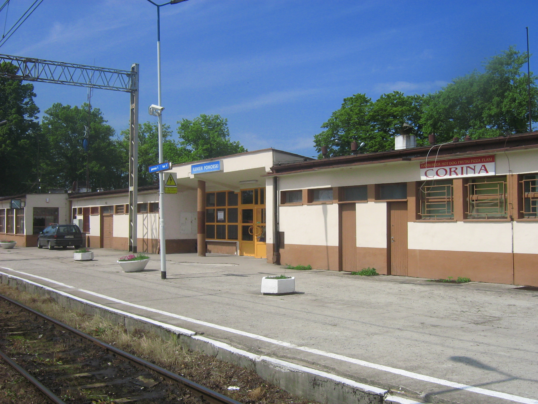 Kamień Pomorski (stacja kolejowa)